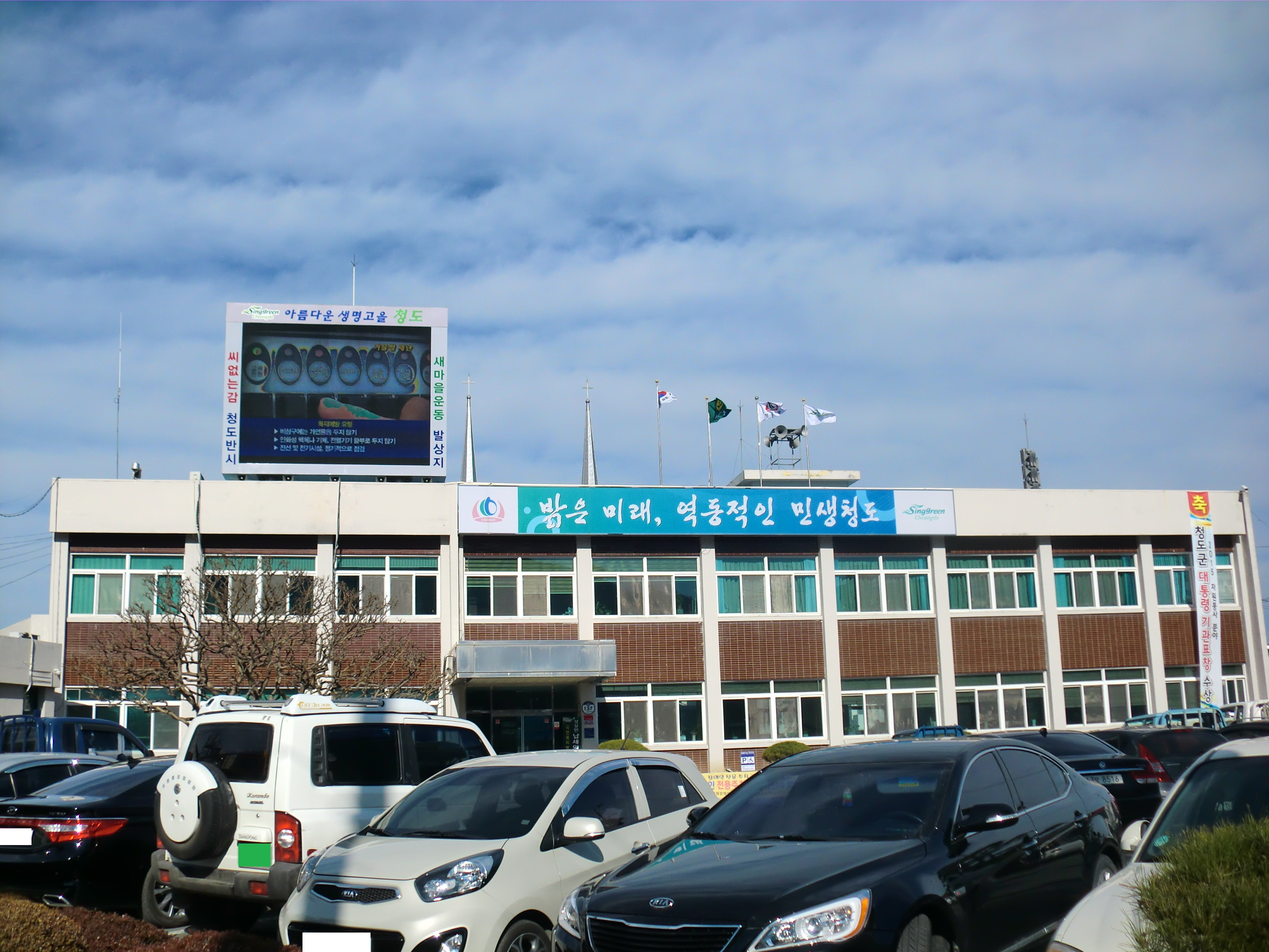 경상북도 청도군에 있는 청도읍사무소